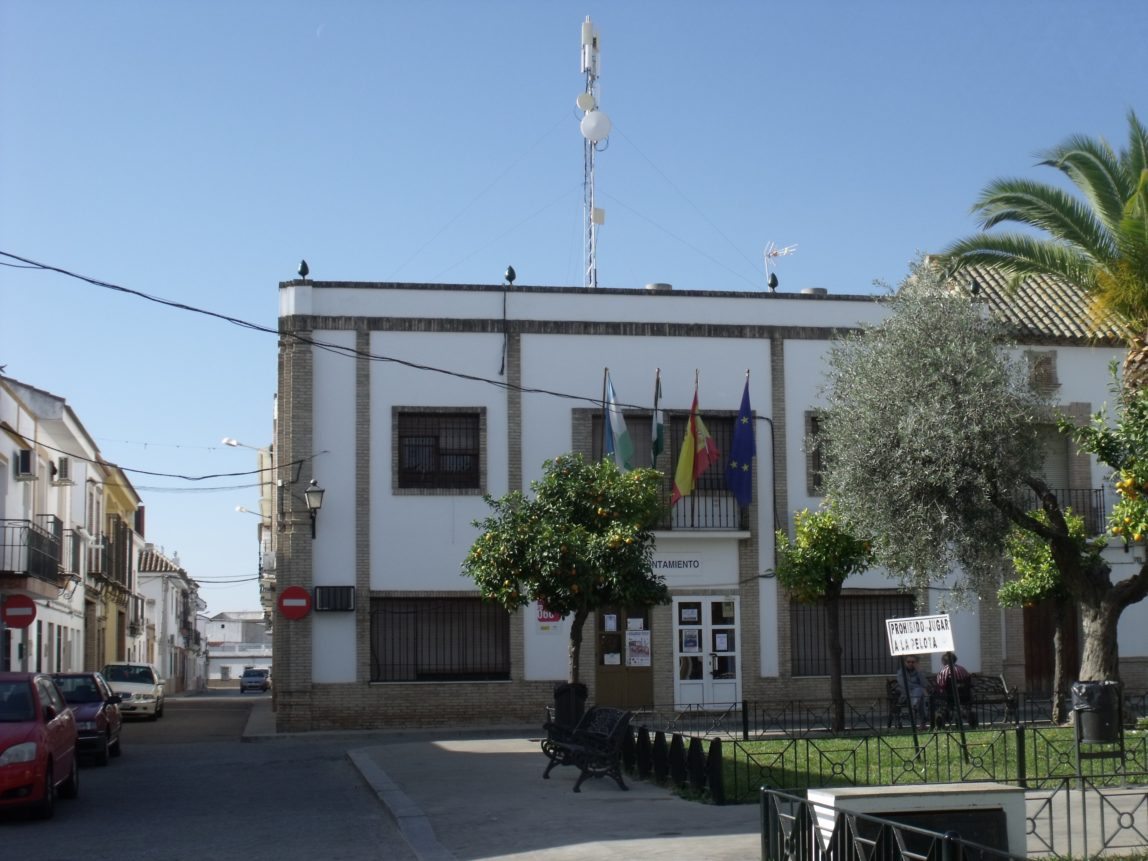 Actual Ayuntamiento